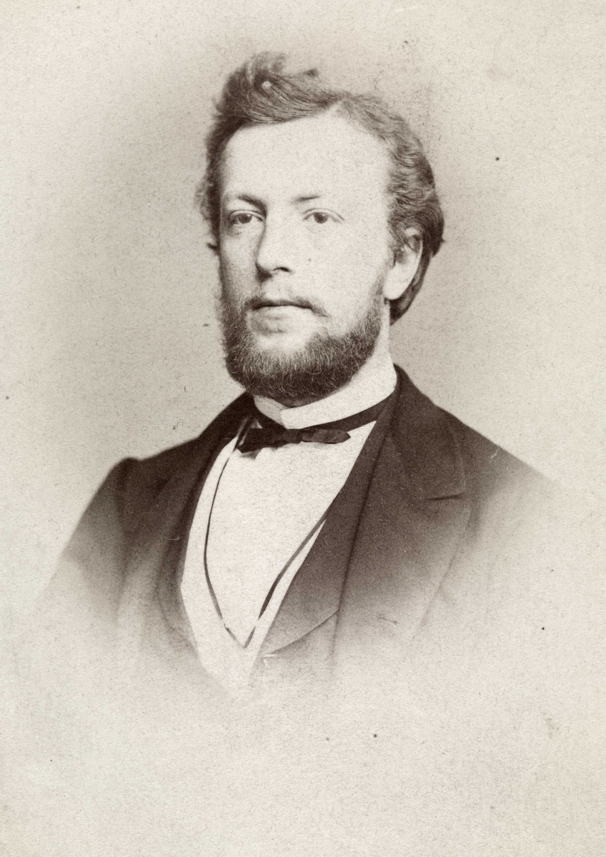 Anton Christian Hall (1841-1911), norsk prest og organisasjonsmann. Medstifter av Norges kristelige ungdomsforbund. Gravlagt på Vår Frelsers gravlund. Portrett, mann, hoffpredikant, vignettert brystbilde.